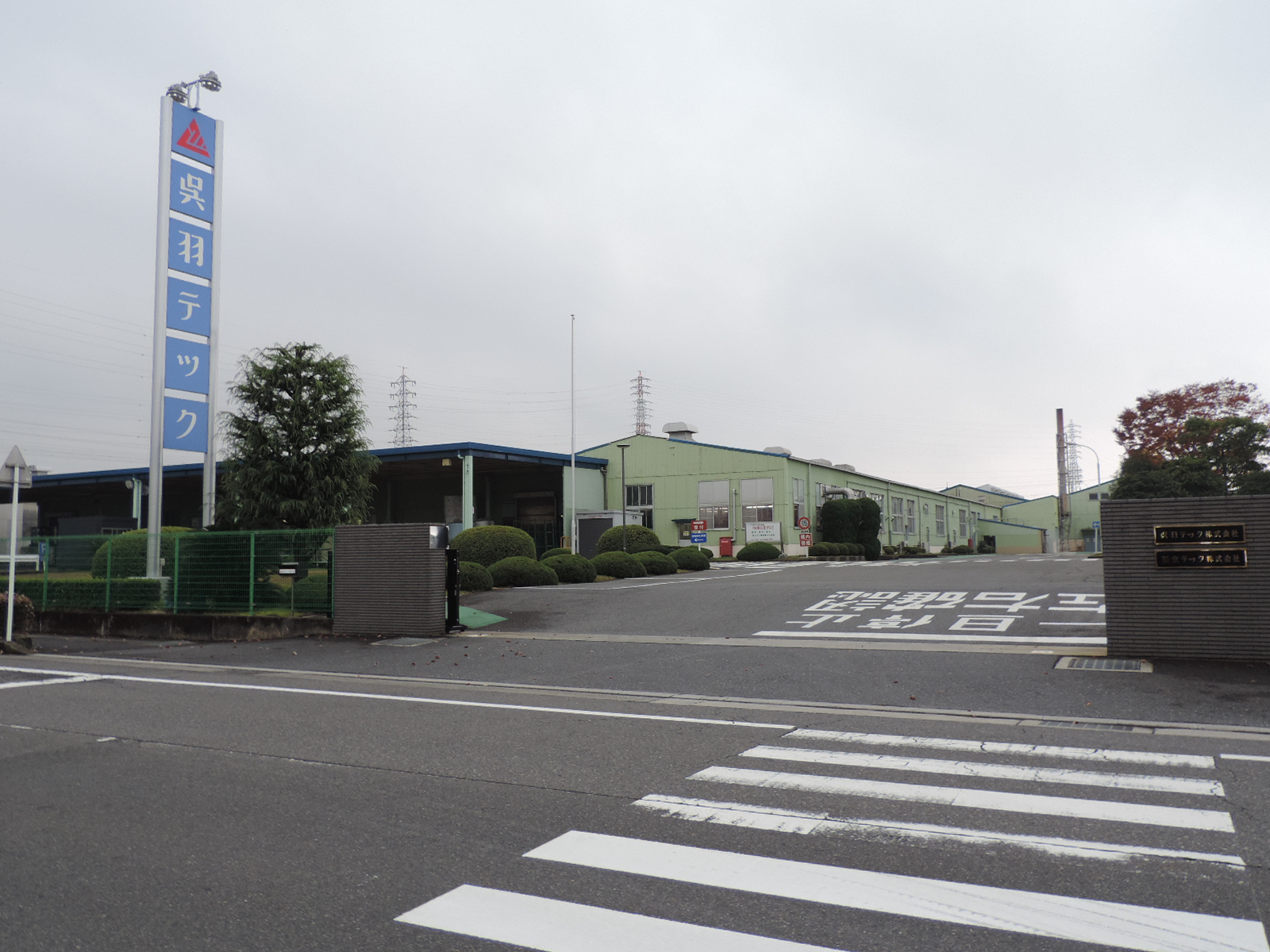 呉羽テック株式会社本社工場（滋賀県栗東市）。2017年撮影